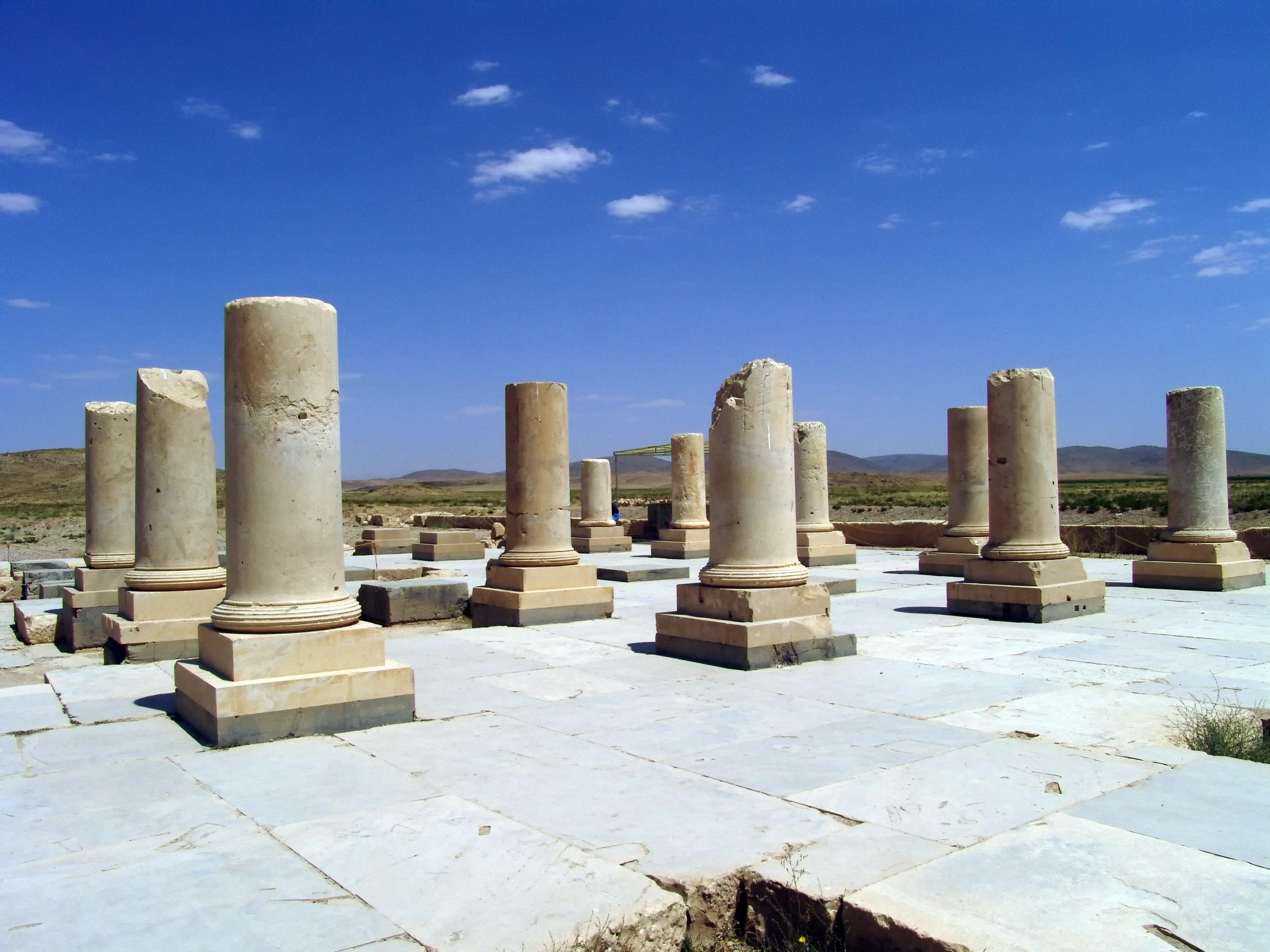 کاخ اختصاصی در پاسارگاد